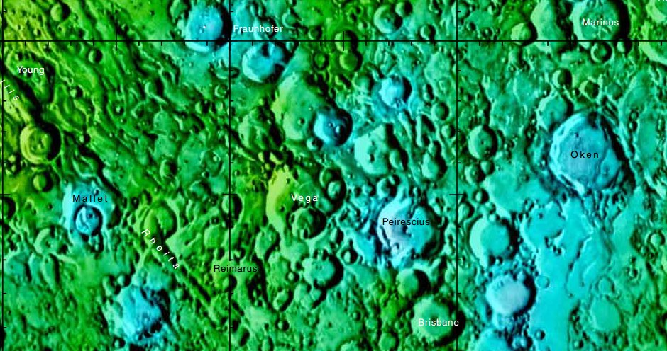 Cráter lunar Peirescius. Localización. (Imagen LRO)